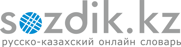 Қазақша (кирил): Сөздік